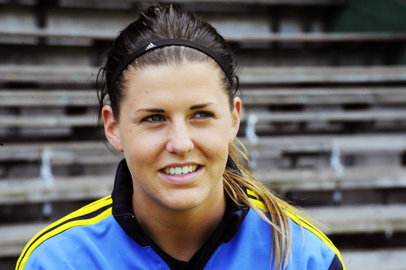 a_34_9854